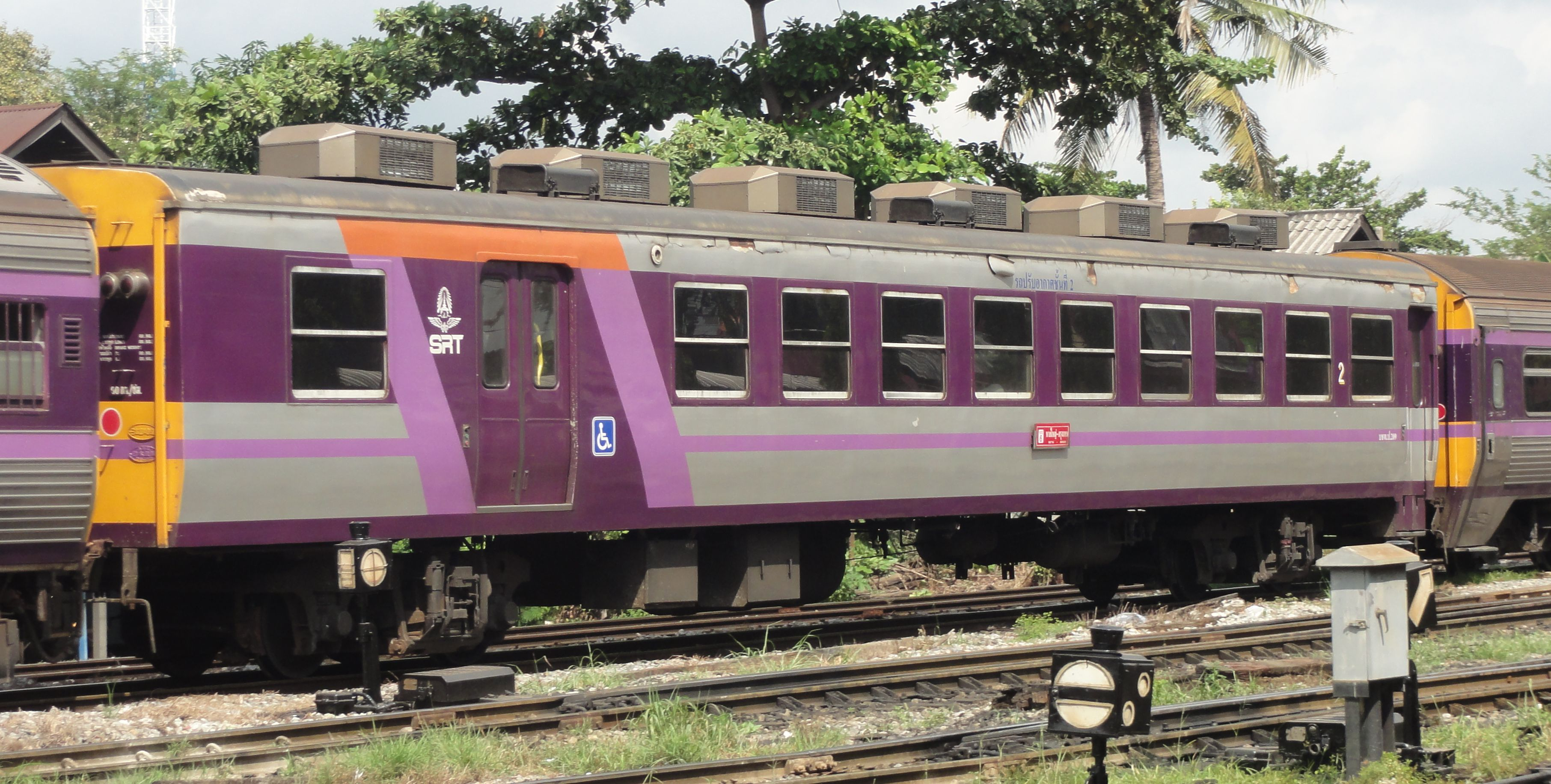 タイ国鉄オハ12車いす対応改造車